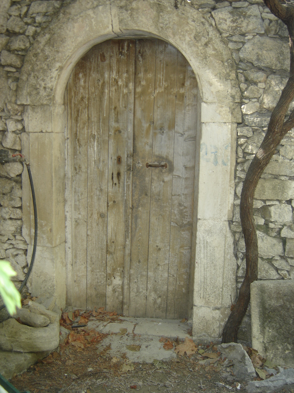 Παλιά πόρτα